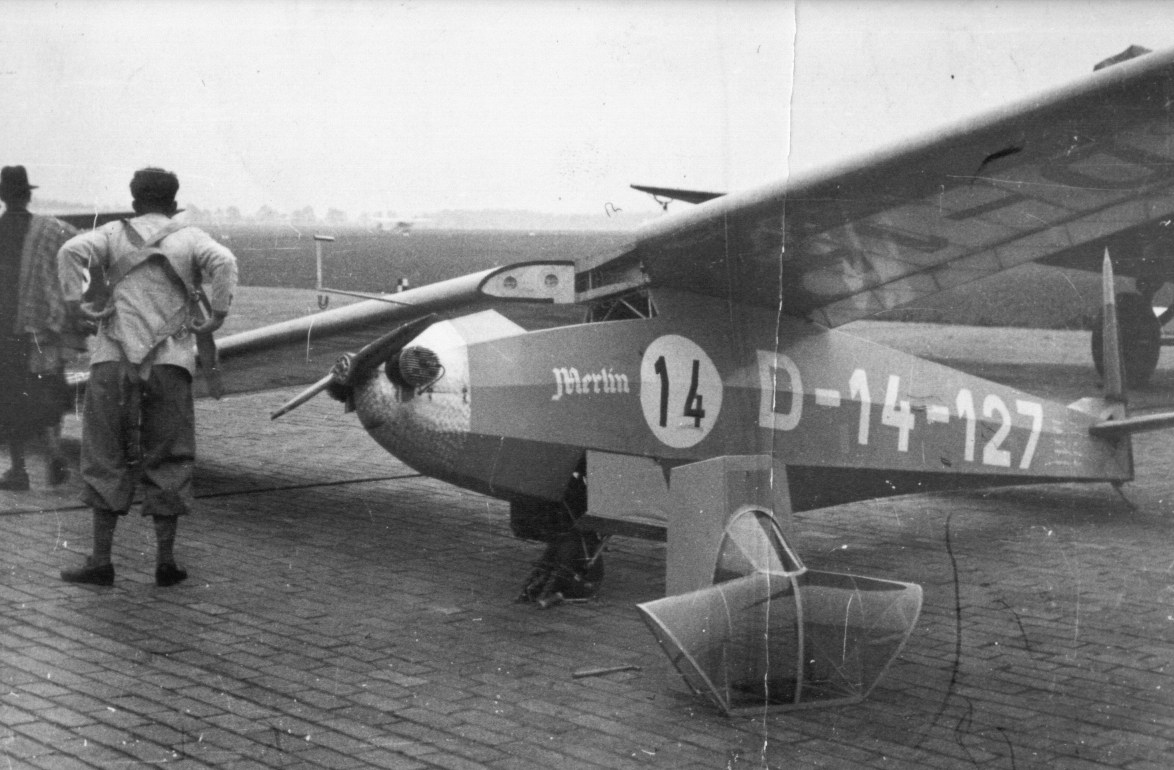 Die Akaflieg München Mü 13 "Motormerlin"